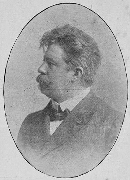 Adolphe Zimmermans